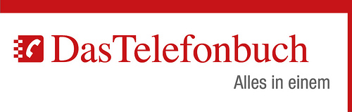 Logo Das Telefonbuch